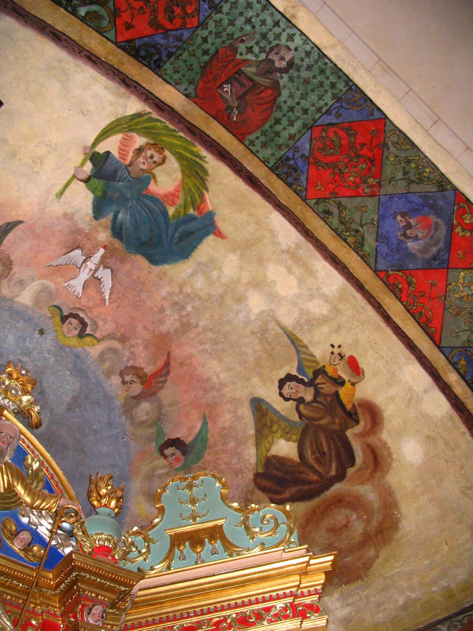 Village de Castet - Fresque du choeur de l'église - Pyrénées Atlantiques - France